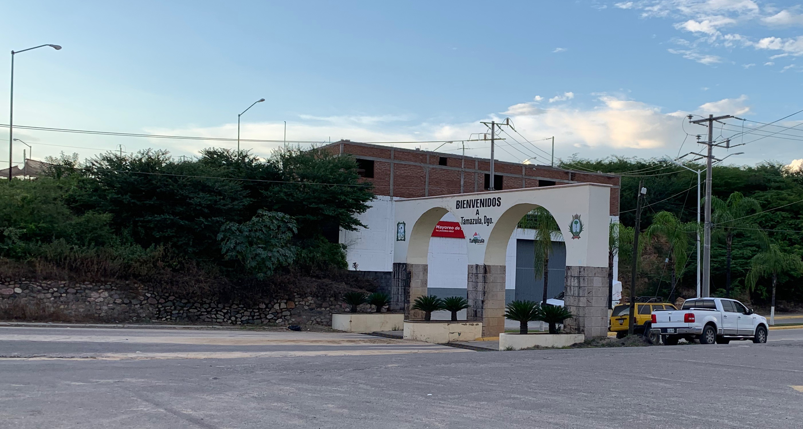 Entry Arches into Tamazula Dgo Mx